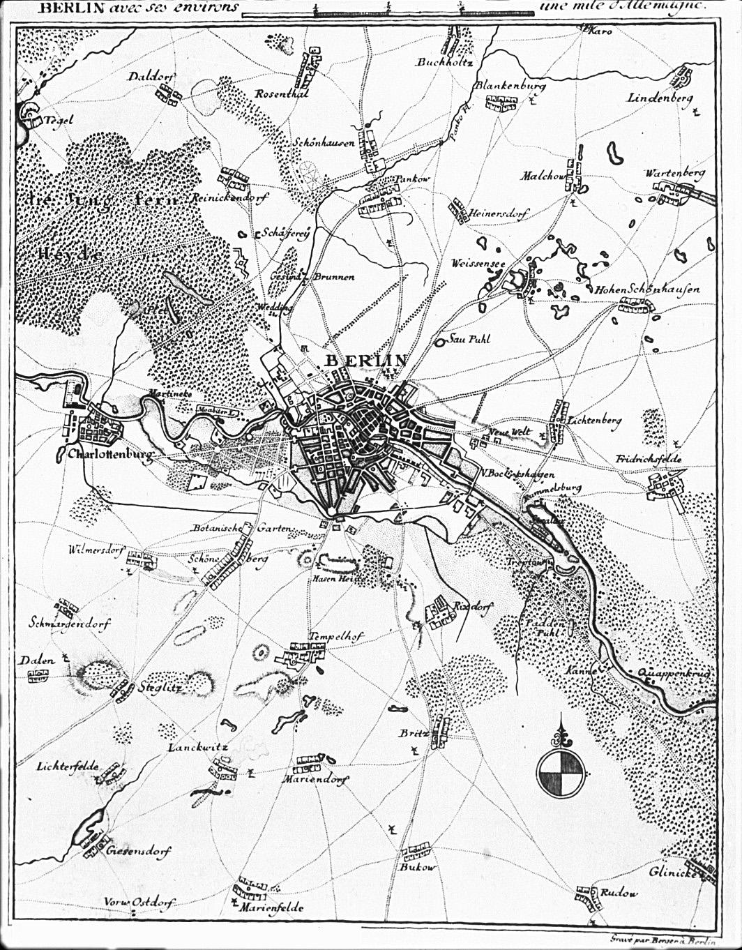 BERLIN avec ses Environs Format: 12,8 x 16,1 cm Maßstab: 1:140.000 Kupferstich, einfarbig Über der Karte steht der Titel zusammen mit einem gezeichneten Maßstab über "une mile d'Allemagne". Unten rechts ein Hinweis auf den Stecher: "Gravé par Berger à Berlin". Im Plan rechts unten ein Kompaß, wie in der Karte von Rhode (1772). Das Stadtgebiet entstammt ebenfalls der Karte von Rhode. Neben dieser Karte, existiert noch eine Version mit deutschem Titel GEGEND UM BERLIN aus dem Jahr 1772 von Rhode und Berger.